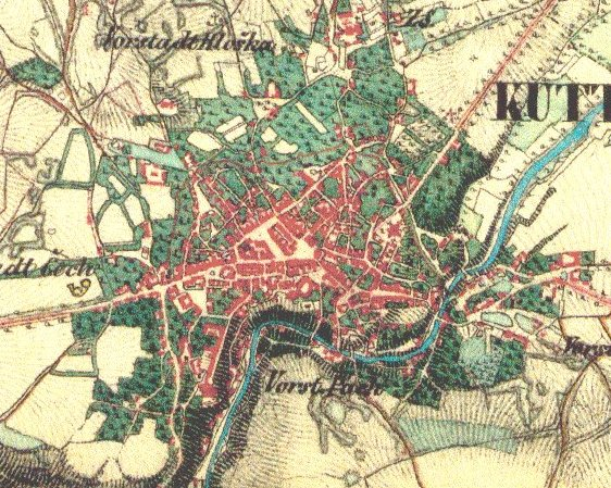 Kutná hora - výřez z historické vojenské mapy